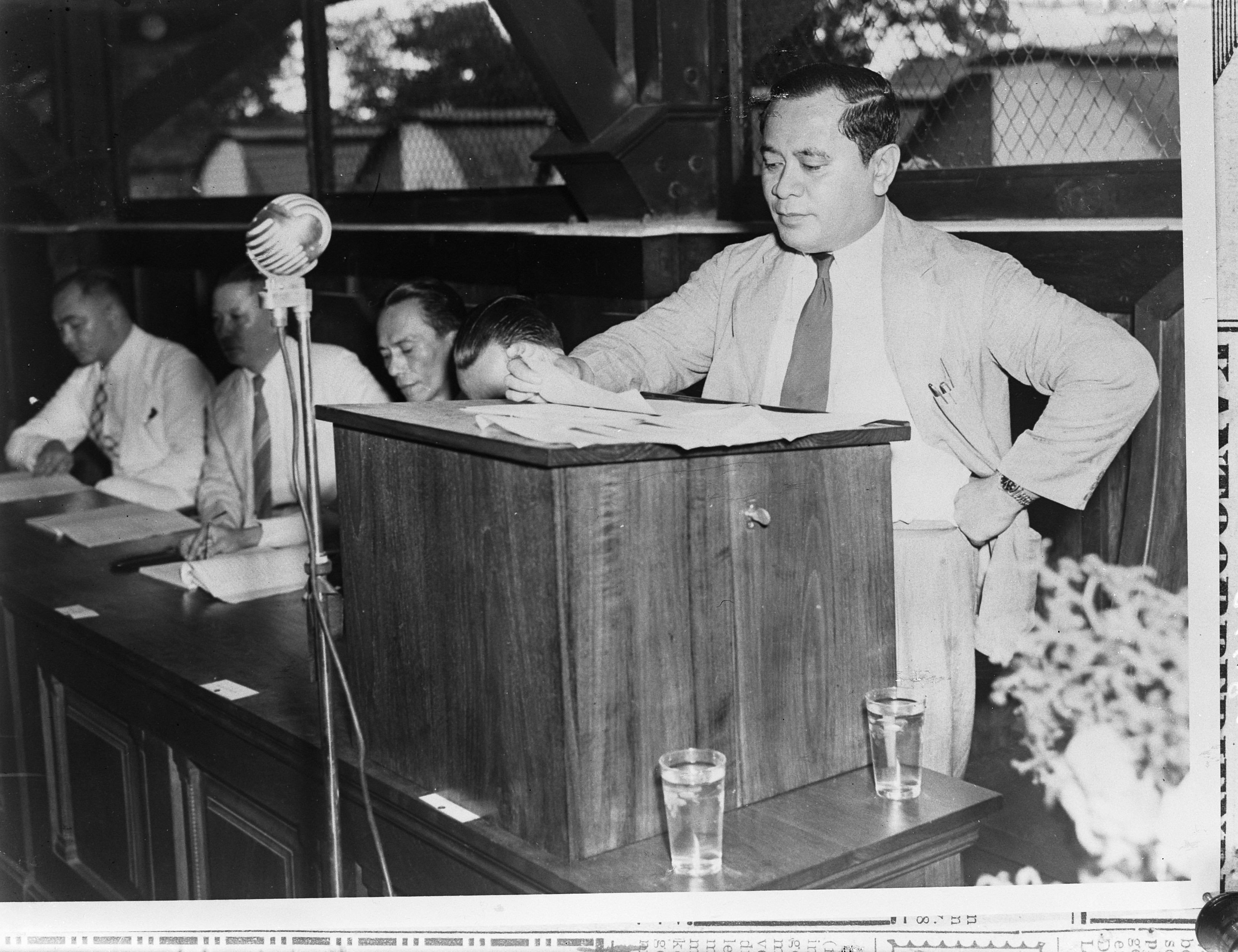 Collectie / Archief : Fotocollectie Anefo Reportage / Serie : [ onbekend ] Beschrijving : Rede Malewa Datum : 30 april 1947 Trefwoorden : redes Fotograaf : NIGIS [Netherlands Indies Government Information Service] Auteursrechthebbende : Nationaal Archief Materiaalsoort : Glasnegatief Nummer archiefinventaris : bekijk toegang 2.24.01.09 Bestanddeelnummer : 902-1430